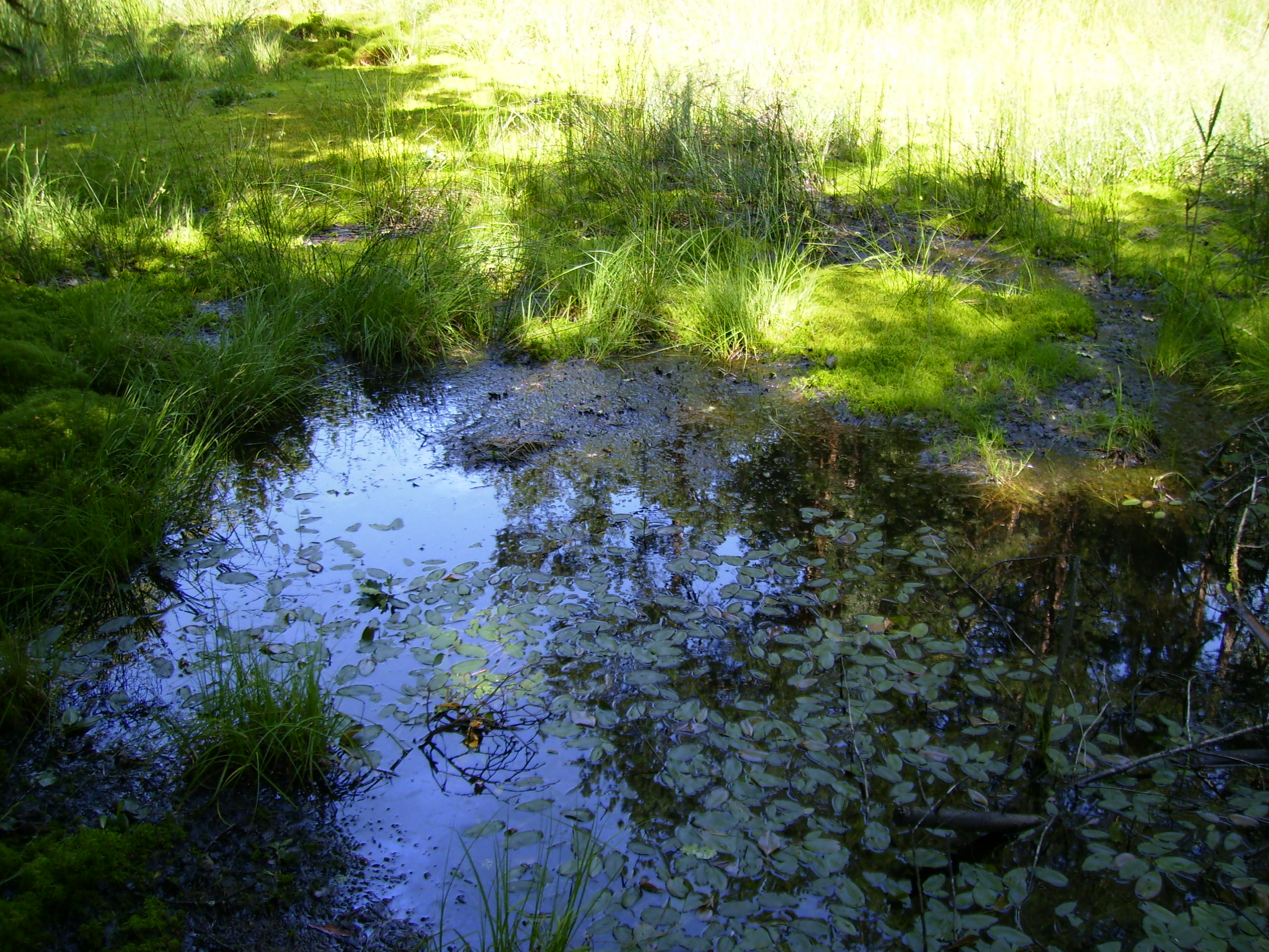 Tůně v lokalitě Blana